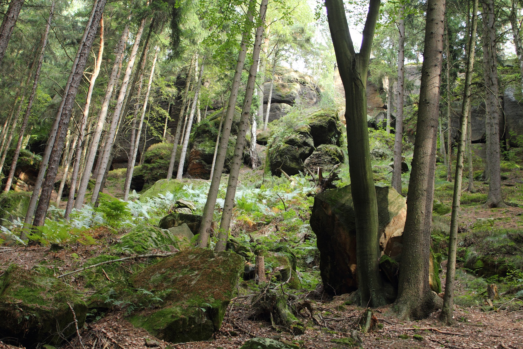 Chlum-Kozlov